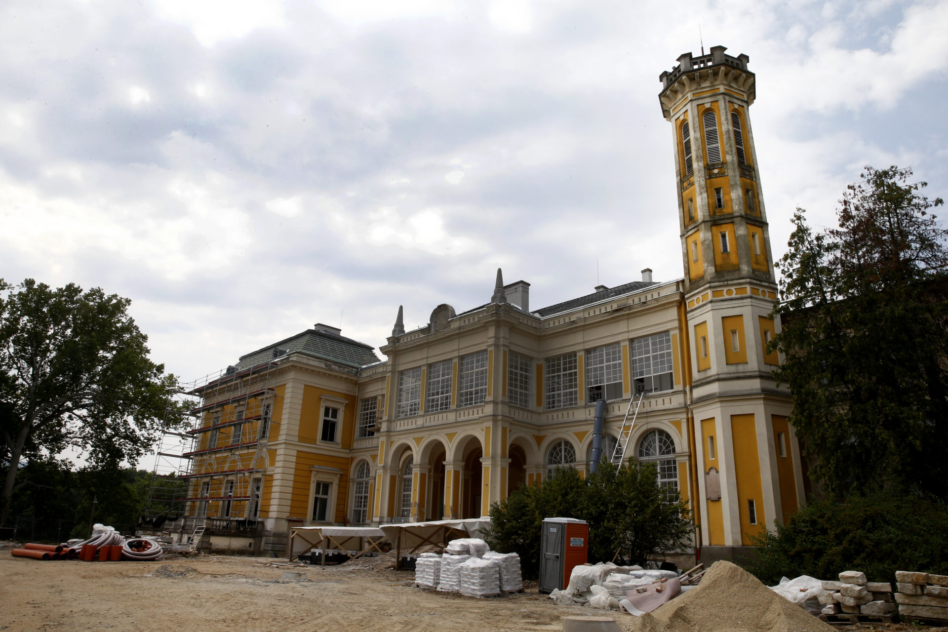 A füzérradványi Károlyi-kastély felújítása a Nemzeti Kastélyprogram és Nemzeti Várprogram keretében.